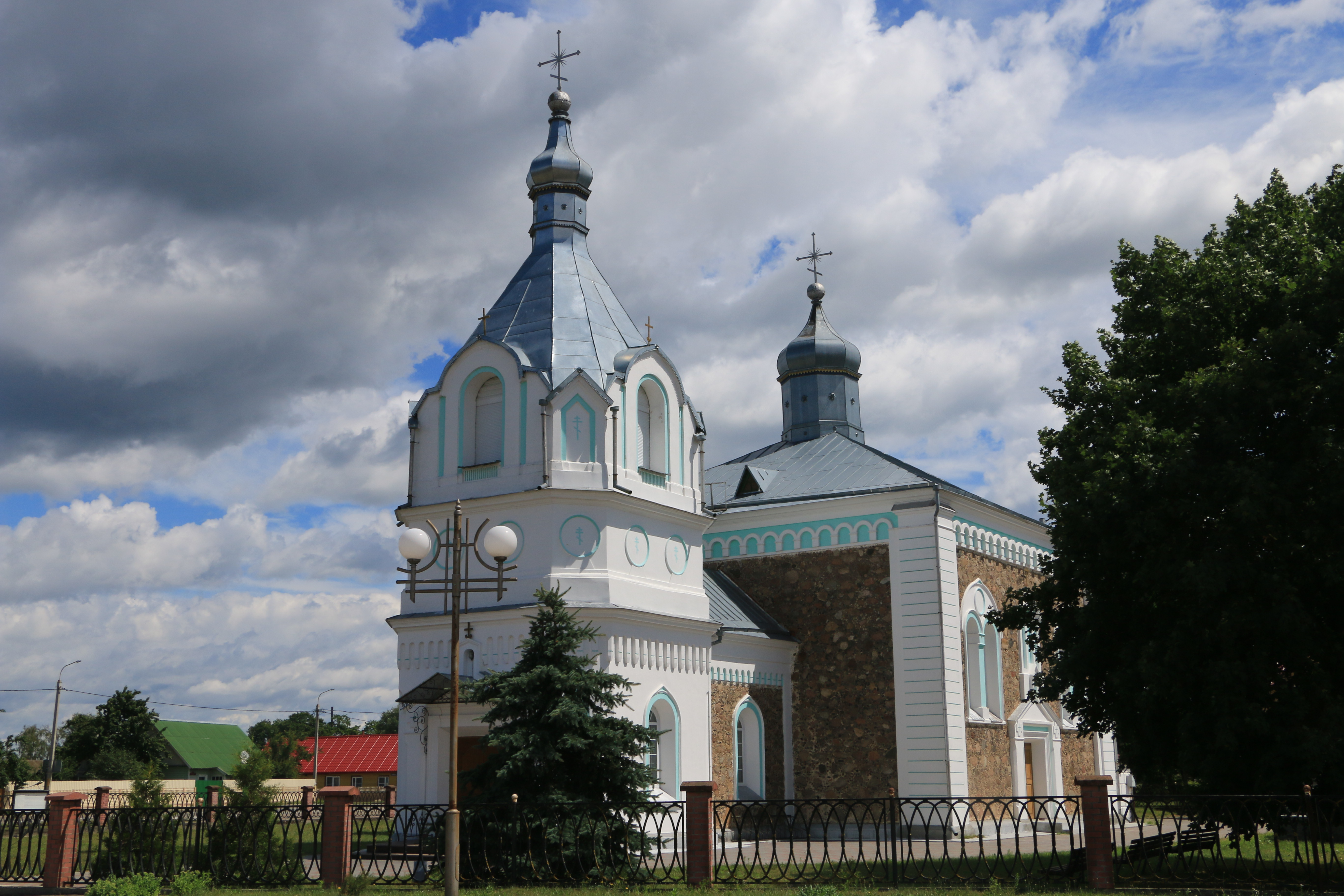 Aziory, Belarus